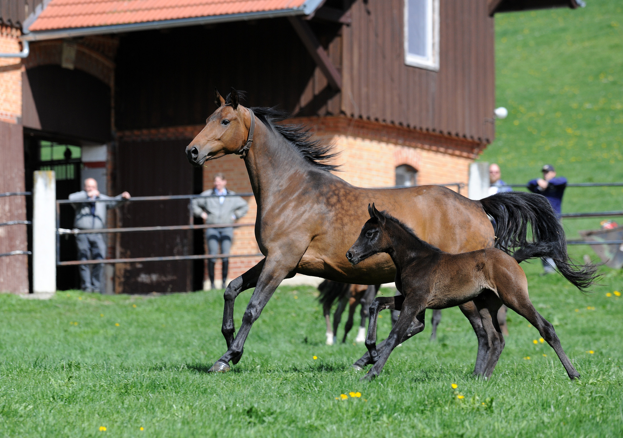 Foto: Stephan Kube